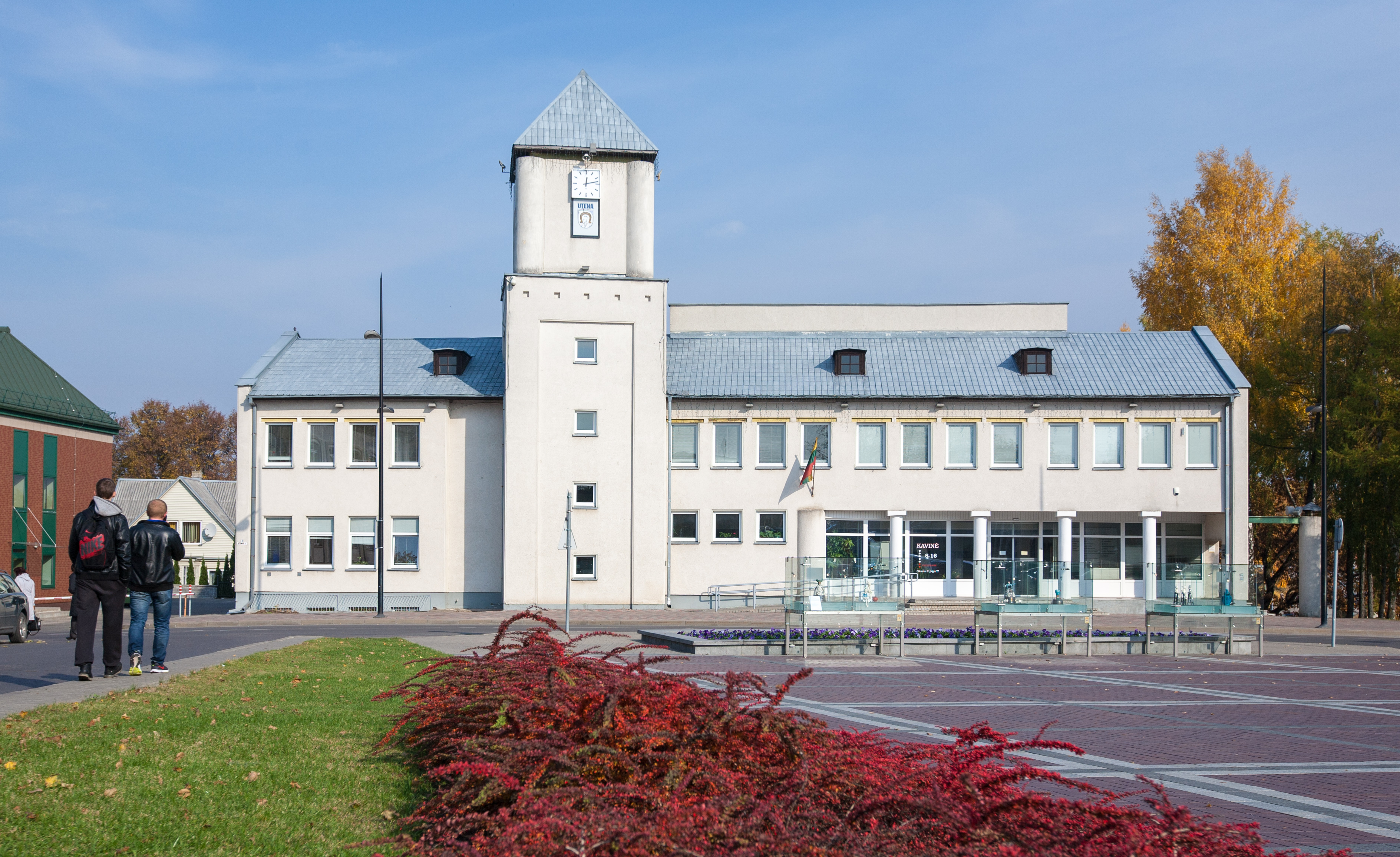 Medicinos fakultetas